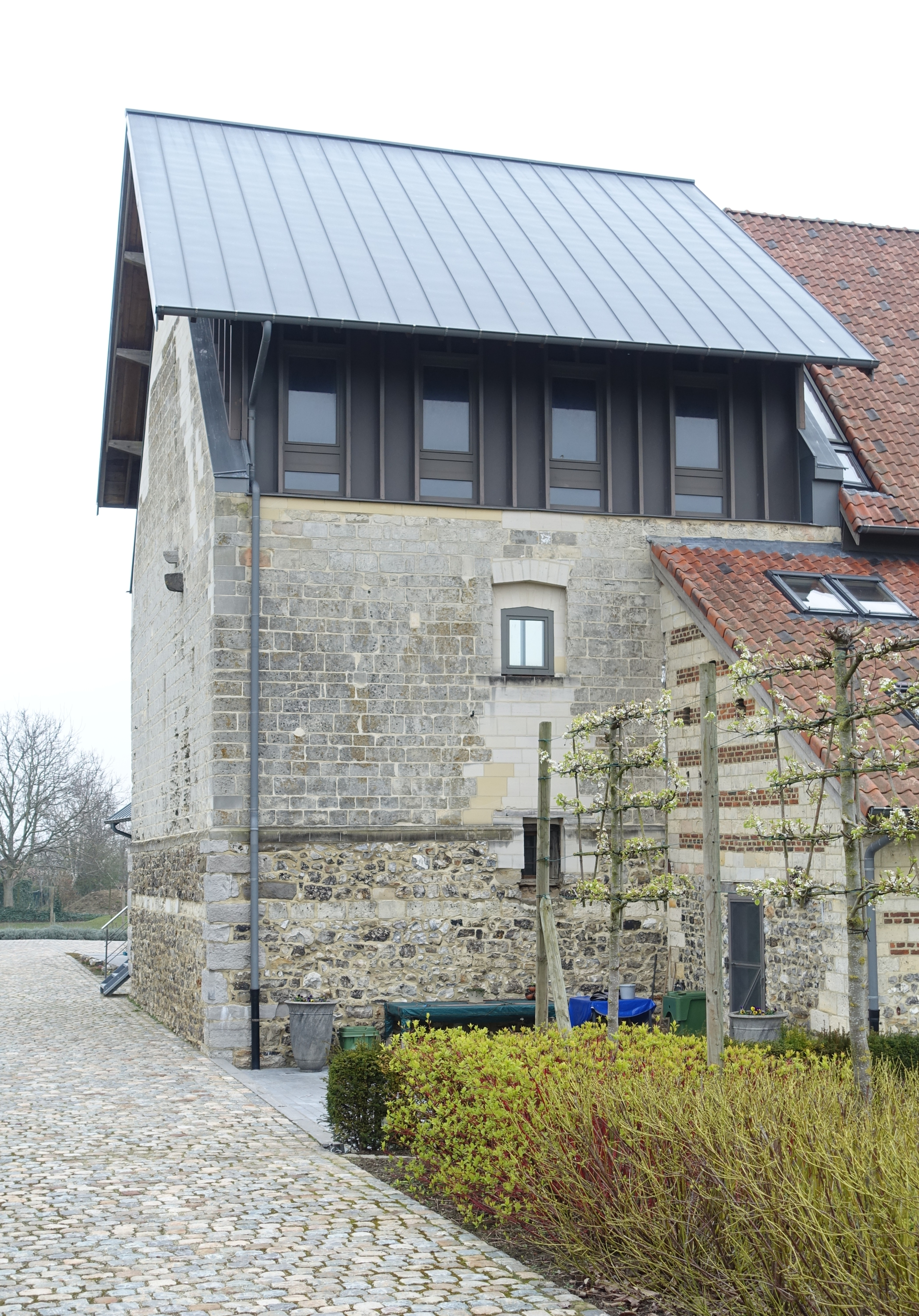 Donjon, woontoren uit 13de eeuw, aan de achterzijde van het Hof van Eggertingen, in Millen (Riemst).